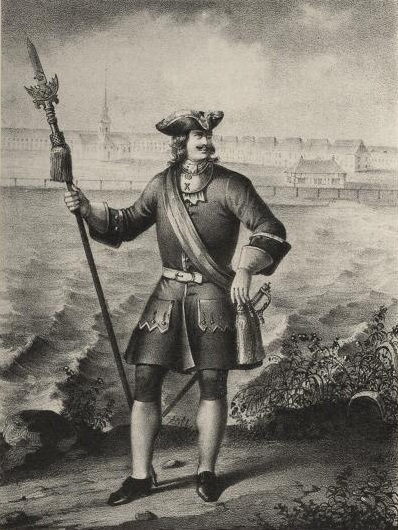 Офицер Пехотного полка, с 1700 по 1732 год. Вид изображает того времени часть Петербургской стороны, с Собором Св. Троицы, гостиным двором, мазанковыми коллегиями и домом, служившим для жительства Петру Великому, при основании С.П.-бурга.